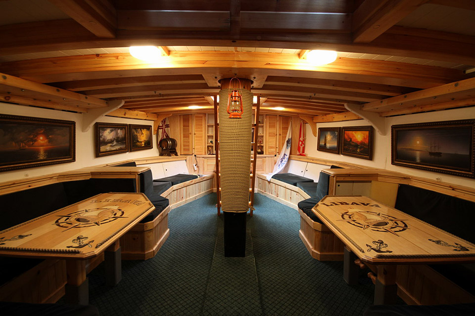 Кают-компания парускника Libava